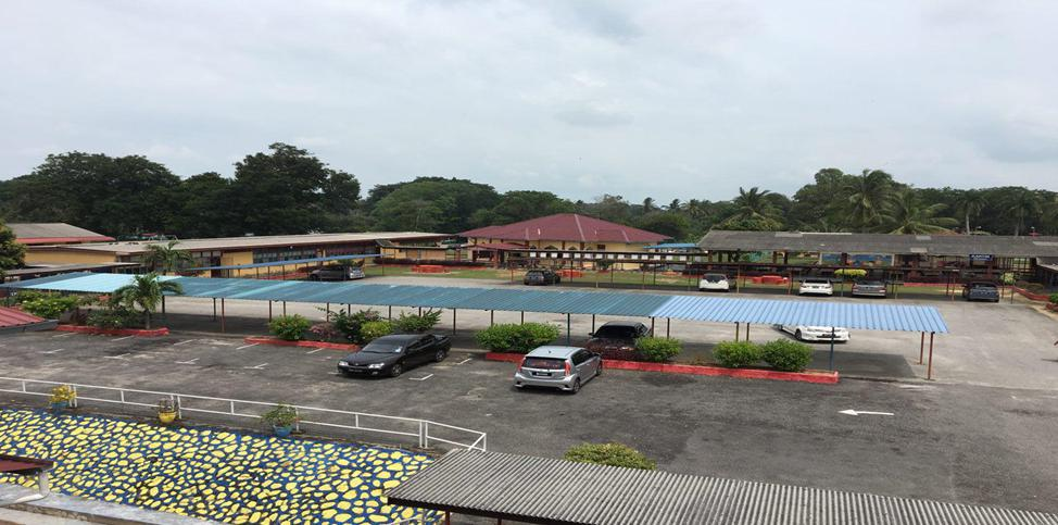 Surau SKKT 1